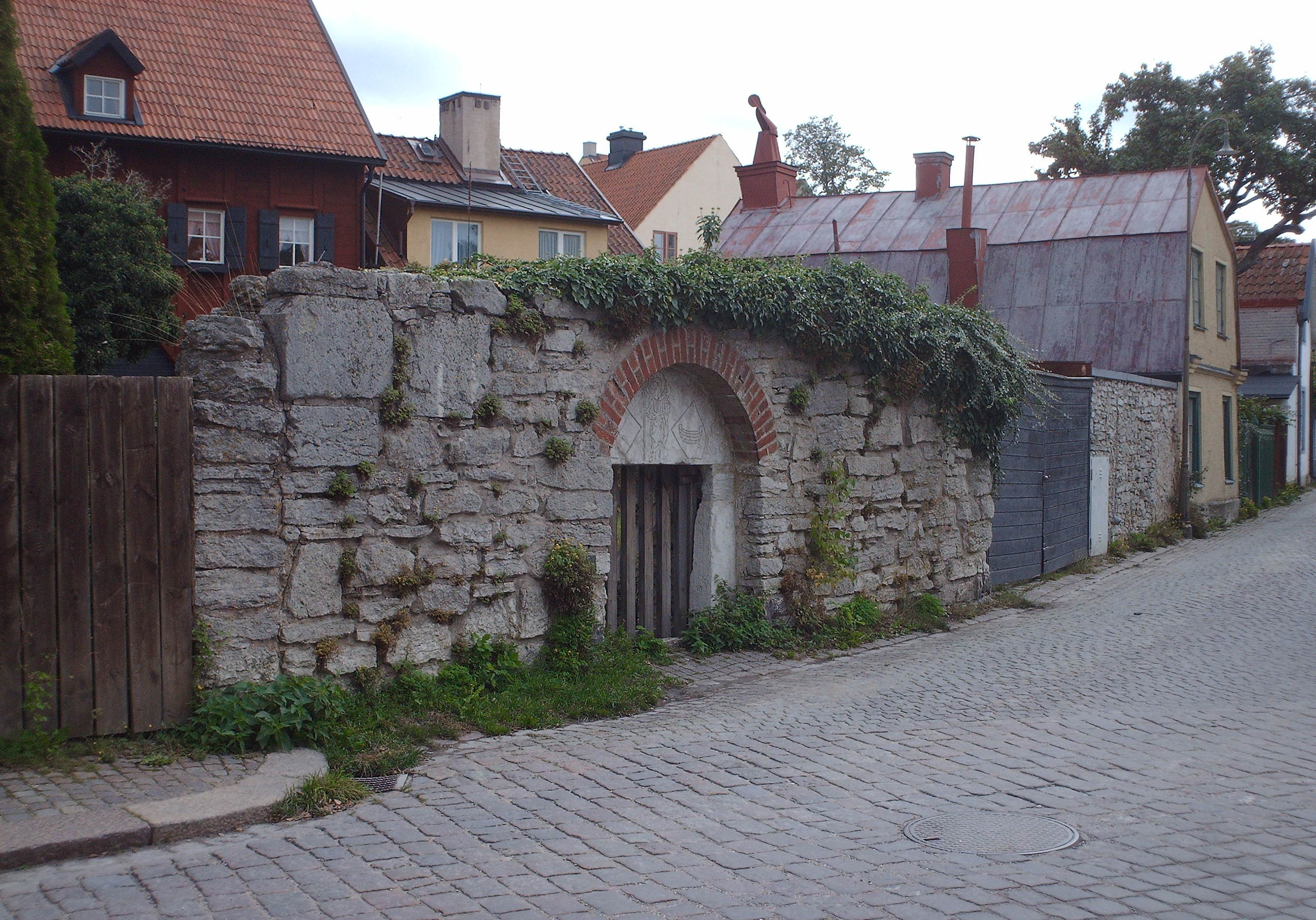 St Gertrud Chapel, Visby, Sweden.